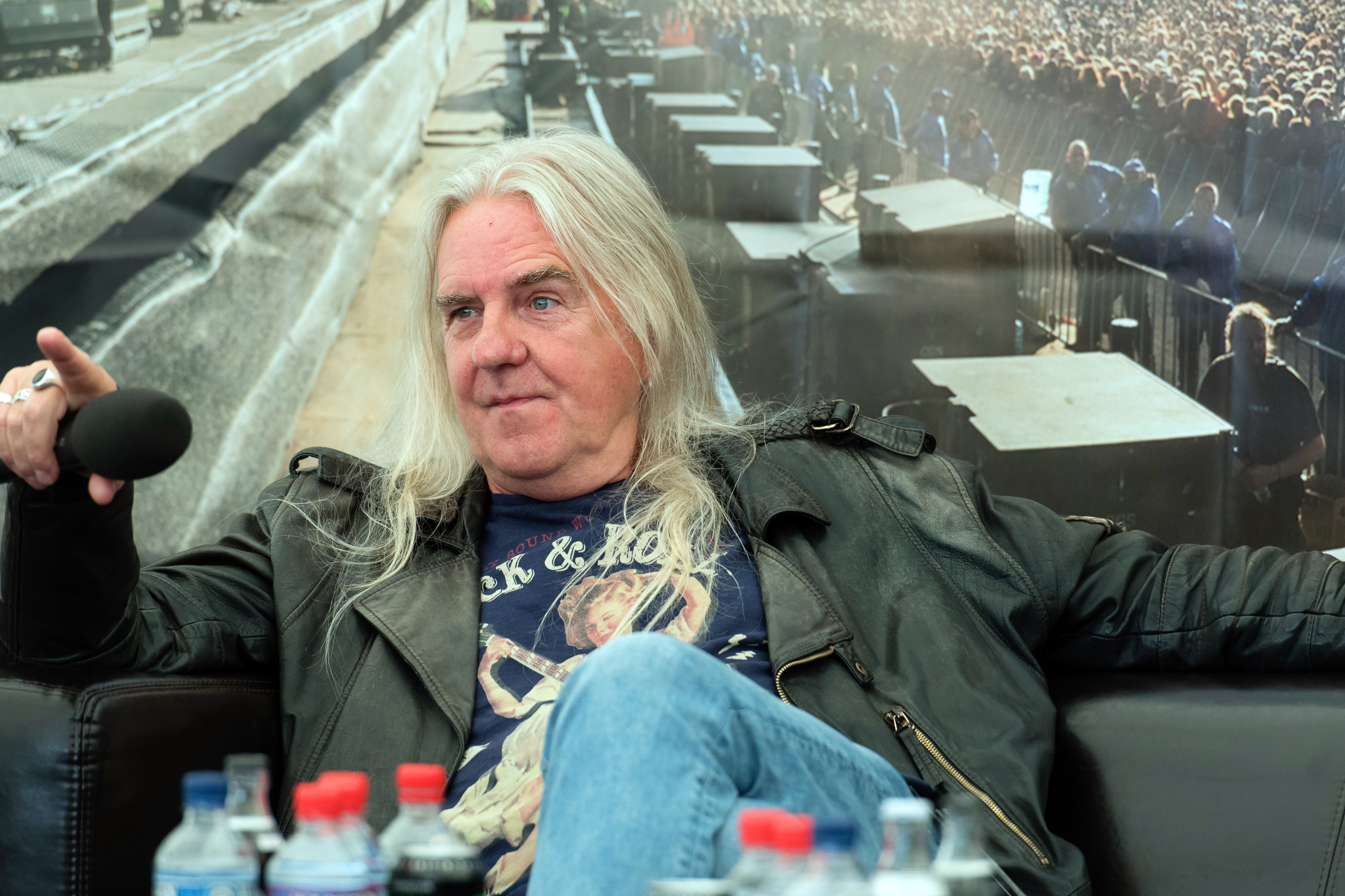 Saxon beim Wacken Open Air 2016